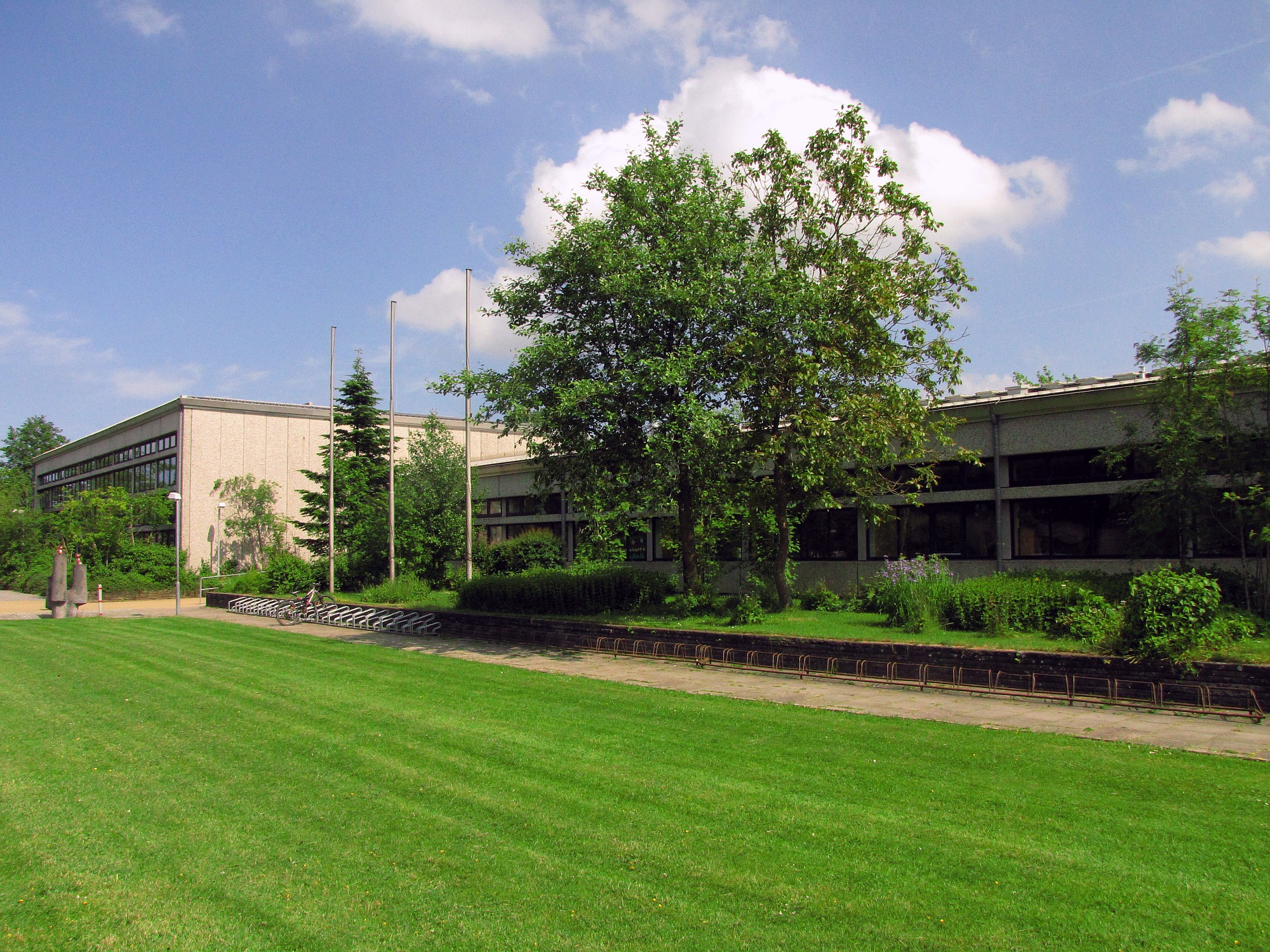 Grundschul-Komplex Hattlundmoor Infrastruktur Steinbergkirche Angeln Kreis Schleswig-Flensburg Foto Wolfgang Pehlemann Steinberg IMG_7136